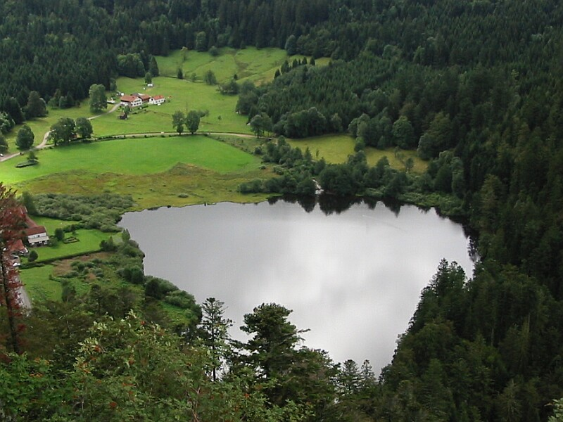 Le lac de Retournemer vu de la Roche du Diable. Situé sur la commune de Xonrupt-Longemer, dans les Vosges.